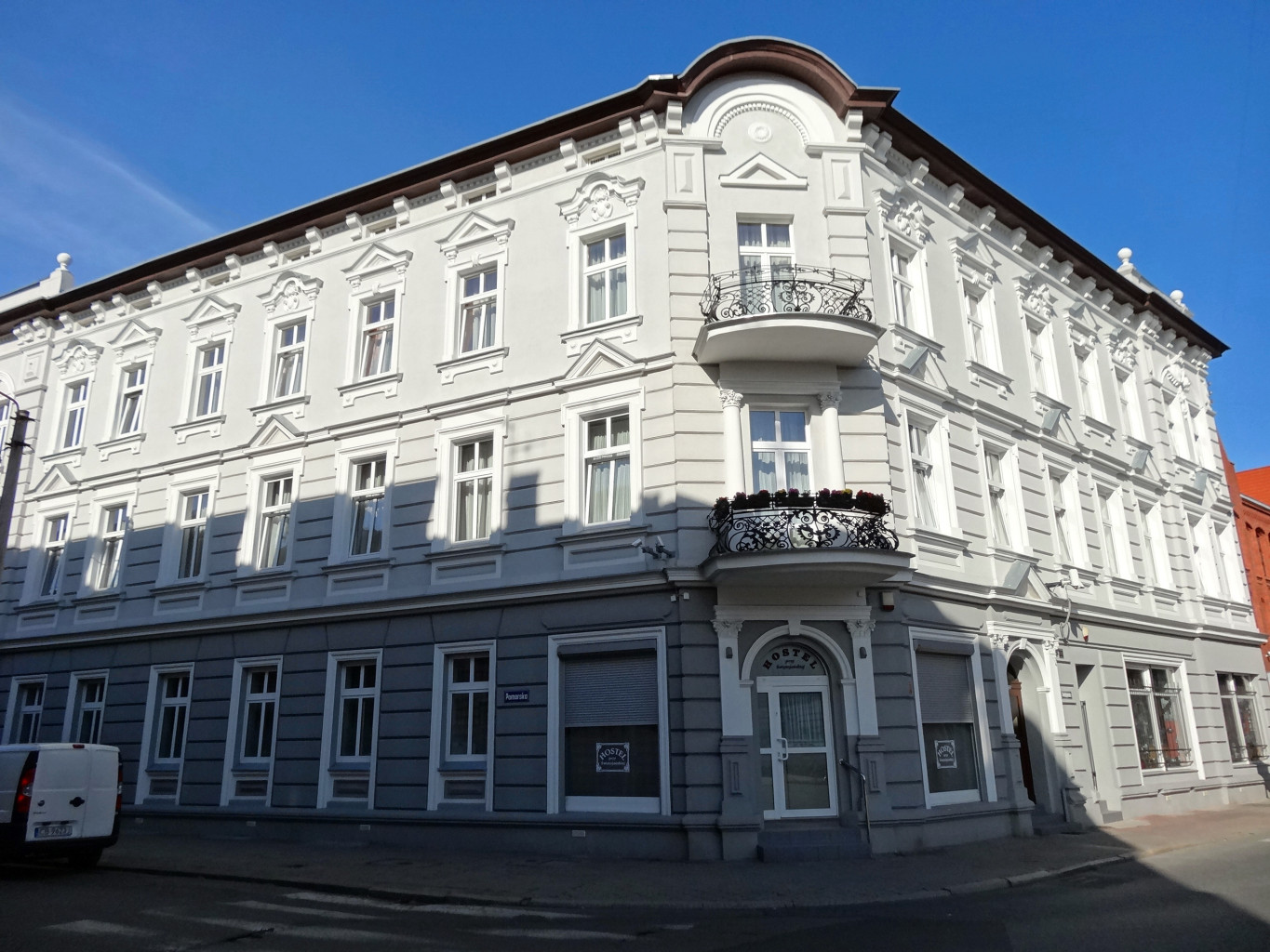 Kamienica Świętojańska 22 róg Pomorskiej 74 w Bydgoszczy